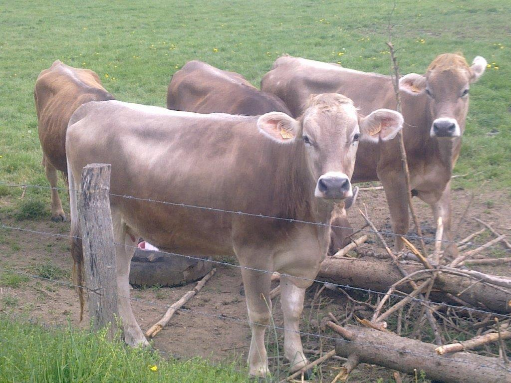 Génisse de race brune des Alpes